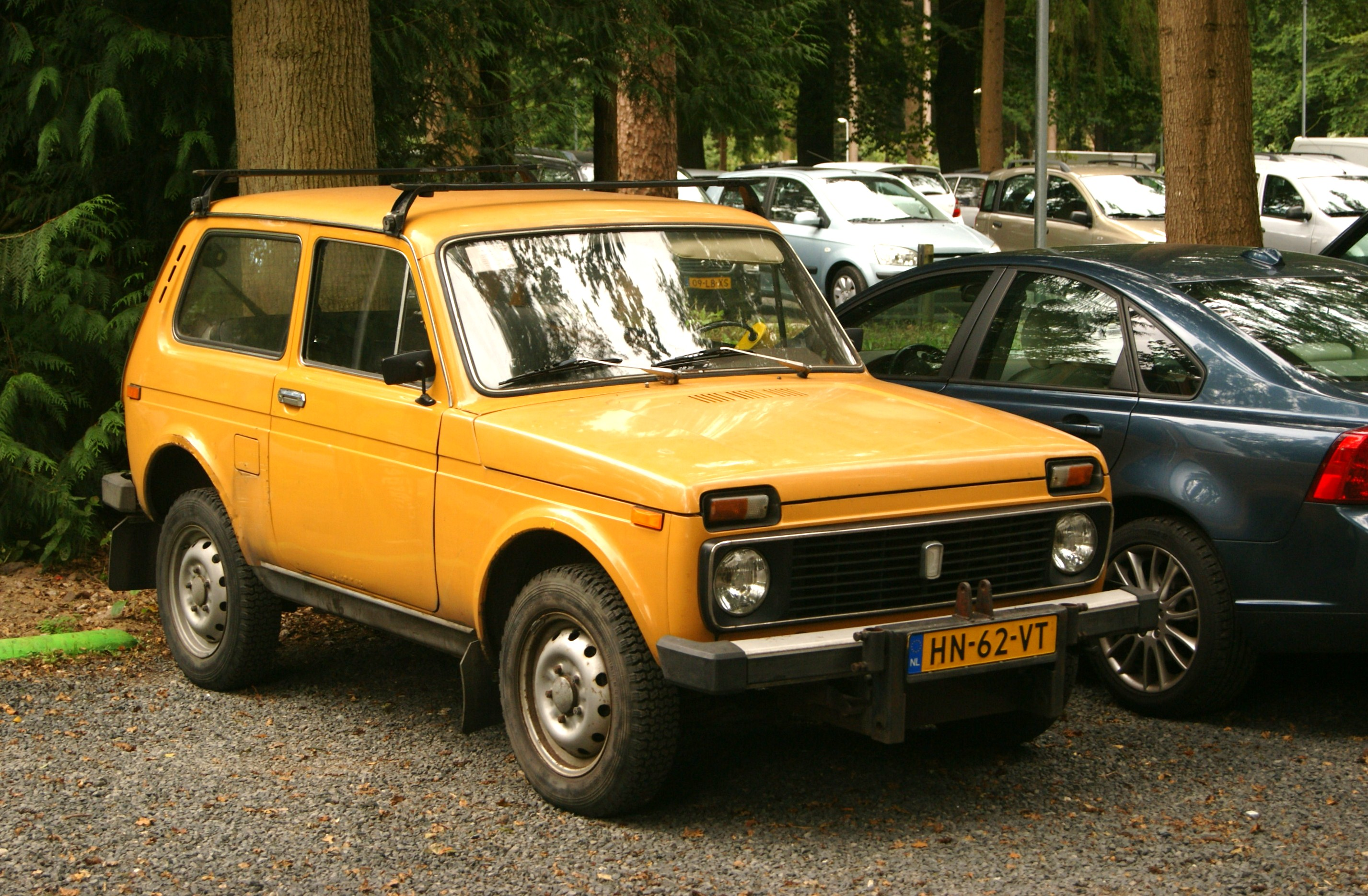 HN-62-VT